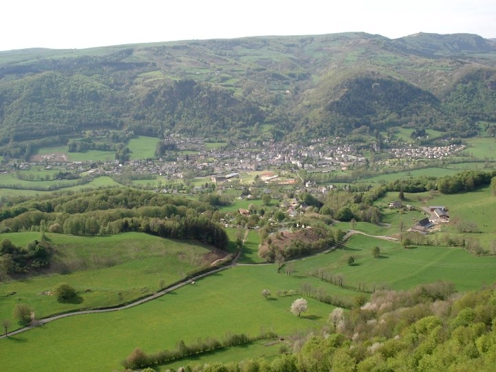 Vue du bourg de Vic depuis le rocher des Pendus.